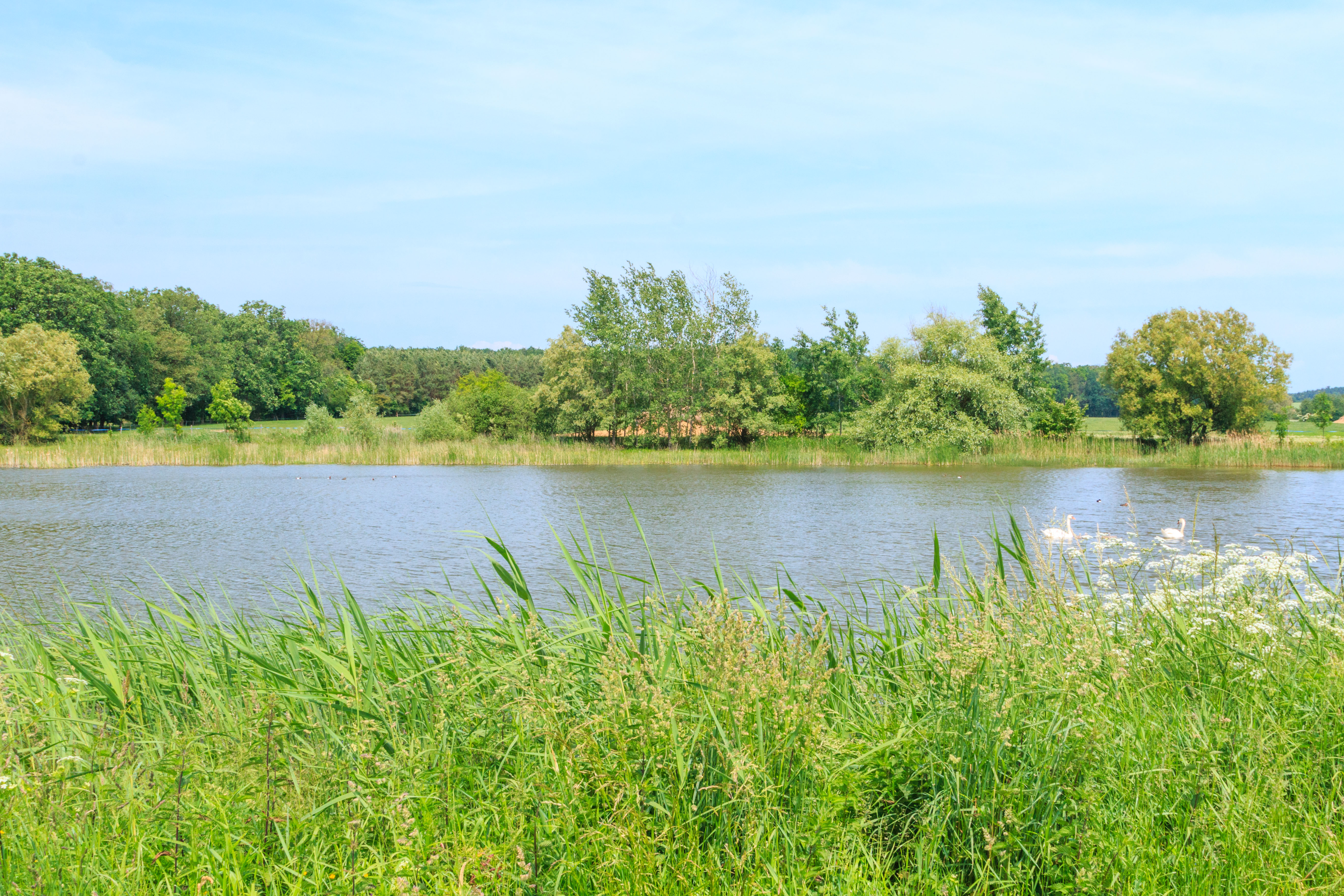 Bílý rybník u Kamenského Dvora Project: Vodstvo